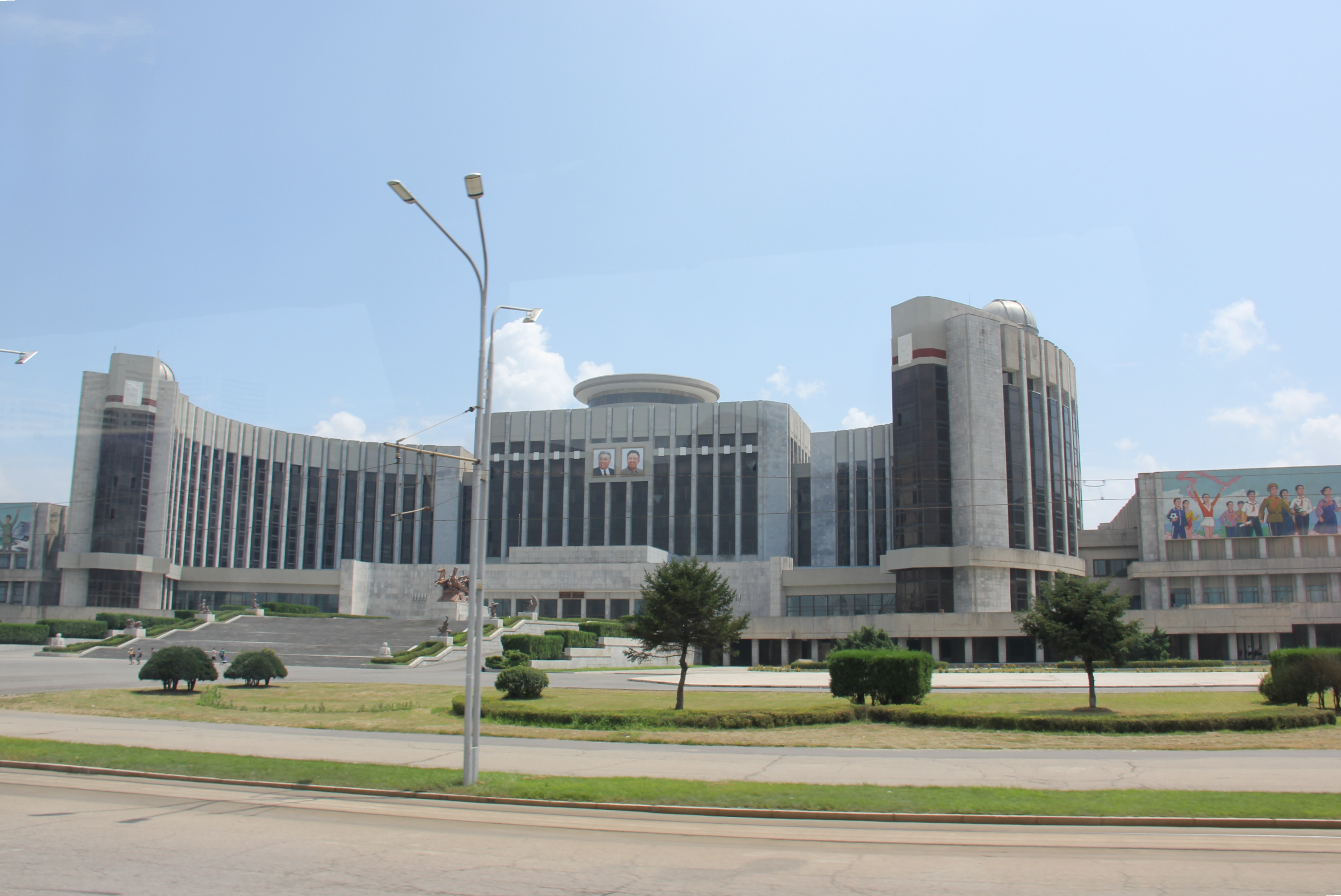 Mangyongdae Children's Palace